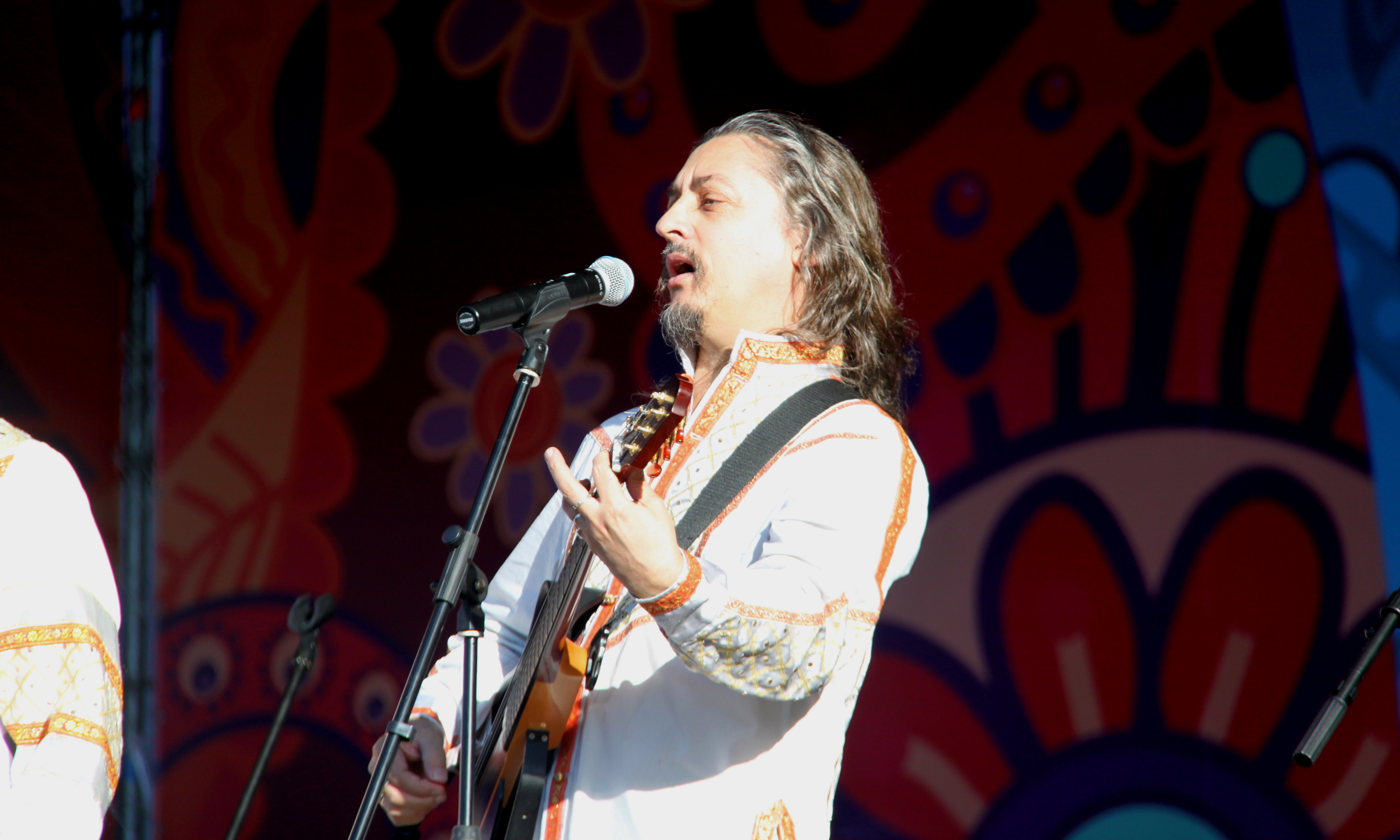 Солист и композитор ансамбля «Белорусские песняры» Олег Аверин на V межрегиональном фестивале славянского искусства «Русское поле-2016». Москва, ГМЗ «Царицыно»